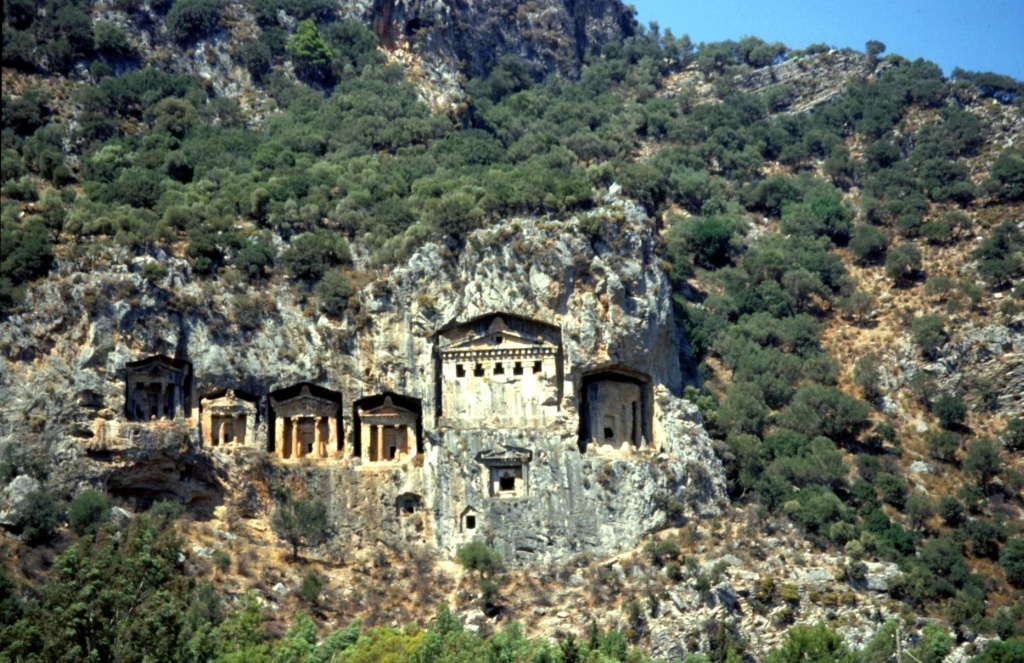 Königsgräber bei Caunos, fotografiert am 31.8.2001 Fotograf: Hans-Heinrich Hoffmann